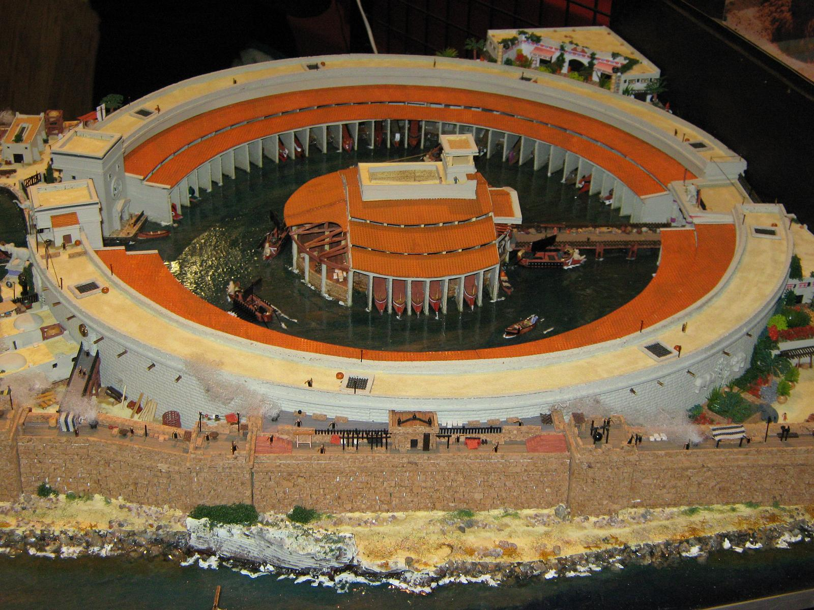 Stand "architecture et histoire" bei der "Expo Trains Modelisme" in Ciney Pierre de Guennec beschreibt sein Diorama des Hafens von Karthago: Nous sommes entre 260 et 220 a.v. Jésus-Christ, sous le règne d'HAMILCAR BARCA durant la première guerre punique. La maquette représente le fabuleux port de CARTHAGE, alors que la ville marchande domine le commerce Méditerranéen, de la Sicile à l'est de la péninsule ibérique et sur toute l'Afrique du Nord. En 146 a.v. J.C. la ville sera entièrement rasée par l'armée Romaine, et reconstruite en 29 a.v. J.C., mais à la romaine.